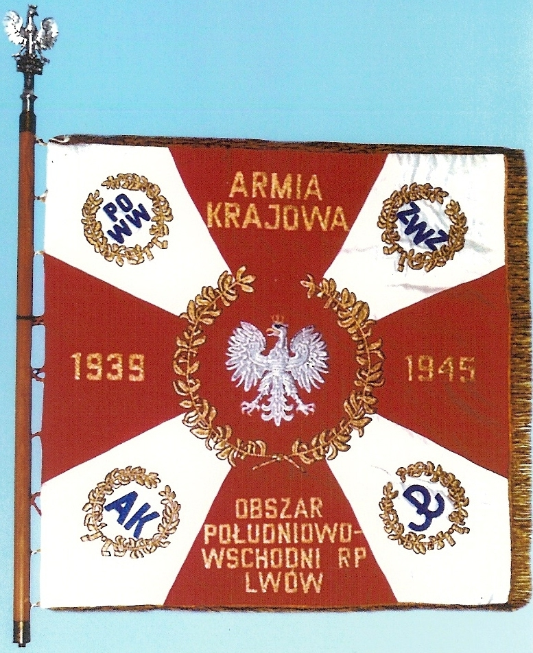 sztandar Obszaru Lwowskiego AK